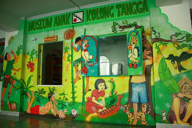 Museum Pendidikan dan Mainan Kolong Tangga